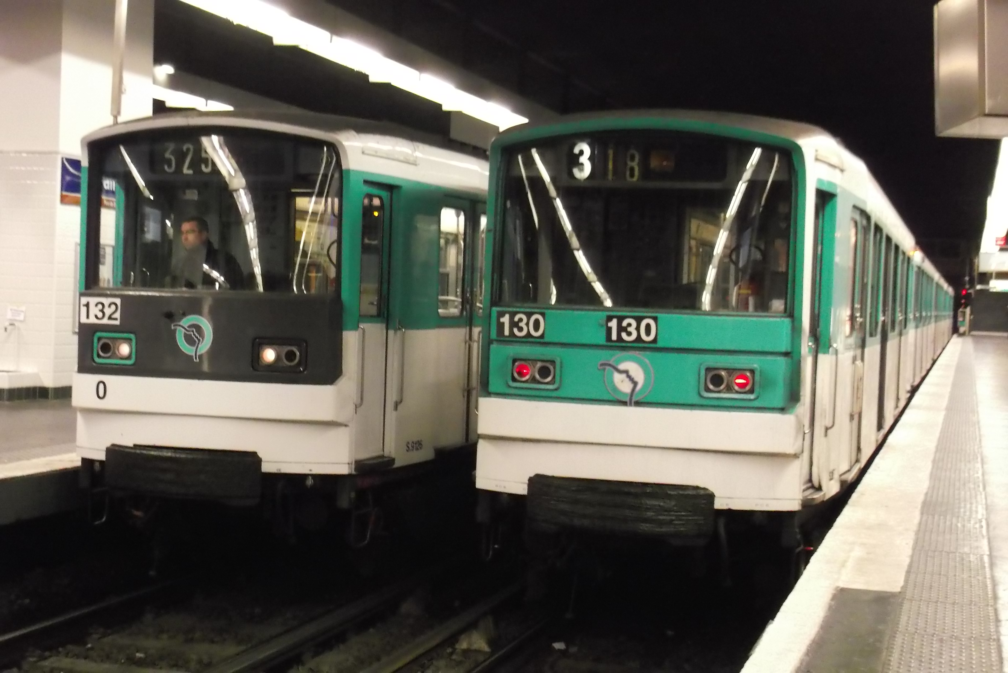 MF67 rénovées de la ligne 3